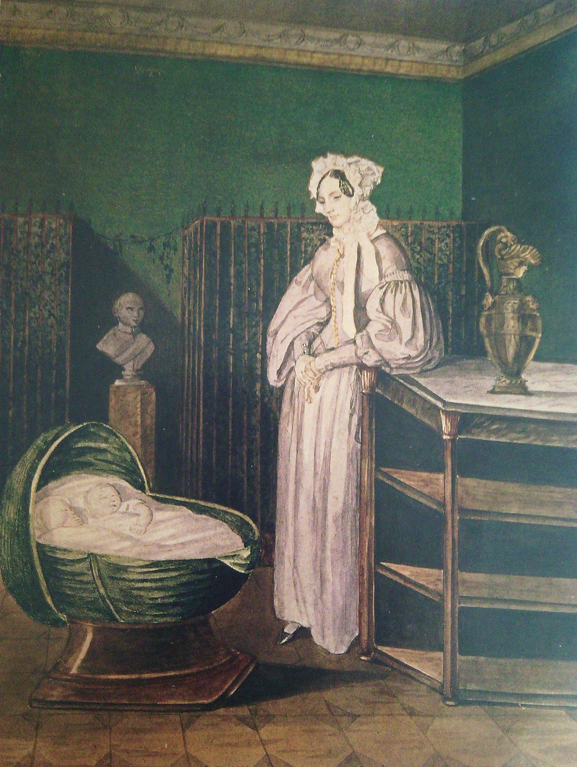 Портрет Александры Ивановны Васильчиковой с детьми-близнецами Василием (1825—1861) и Екатериной (1825—1888).